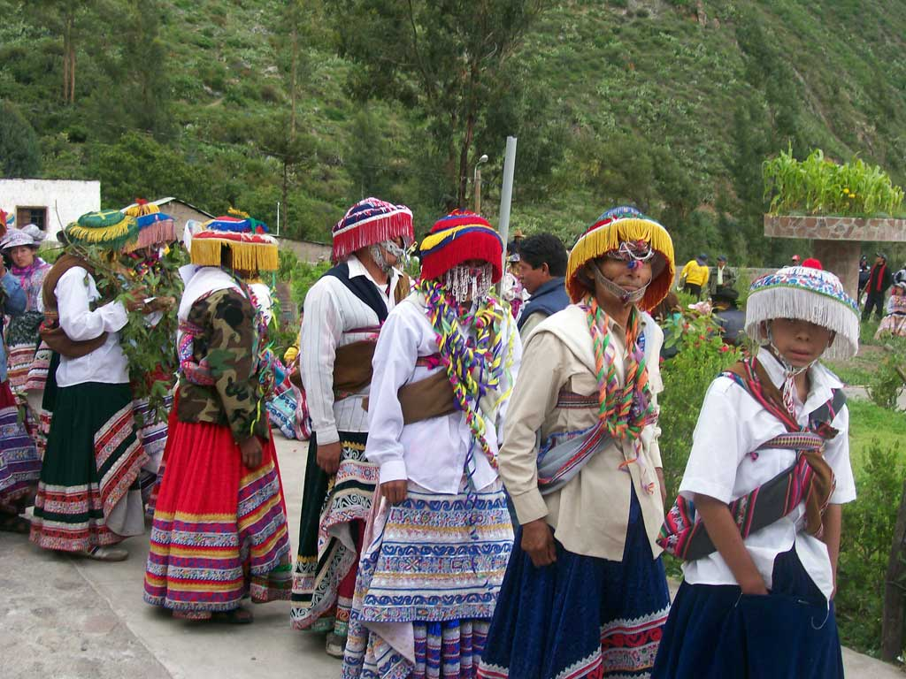 Vestimenta del Wititec